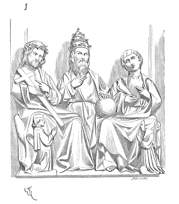 ... Il existe, sous le porche occidental, non terminé, de Saint-Urbain de Troyes, un bas-relief de bois datant des dernières années du XIIIe siècle, qui représente la Trinité (fig. 1) Le Père est au milieu, coiffé de la tiare à triple couronne, comme un pape; de la main droite, il bénit; de la gauche, il tient la terre. À sa droite est le Fils couronné d'épines et portant la croix. À sa gauche, l'Esprit, sous la figure d'un jeune homme imberbe, tenant une colombe. Ces trois personnages n'ont ensemble que quatre jambes, adroitement drapées de façon à faire croire qu'ils en ont deux chacun. De petites figures d'un homme et d'une femme agenouillés (les donateurs) sont sculptées aux deux extrémités du groupe ...